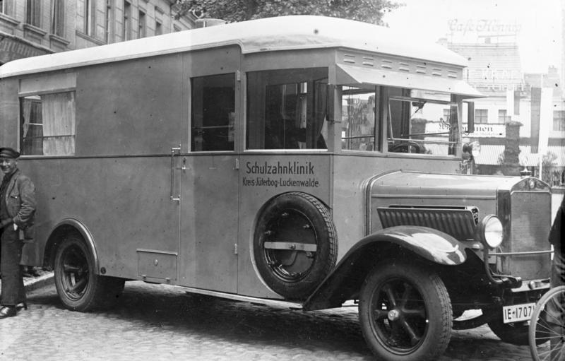 Eine fahrende Schul-Zahnklinik ! In den Kreisen Jüterbog-Luckenwalde wurde ein Auto als Schul-Zahnklinik in den Dienst gestellt, welches die Schulkinder auf ihre Zähne untersucht und behandelt. Das Auto der fahrenden Schul-Zahnklinik.